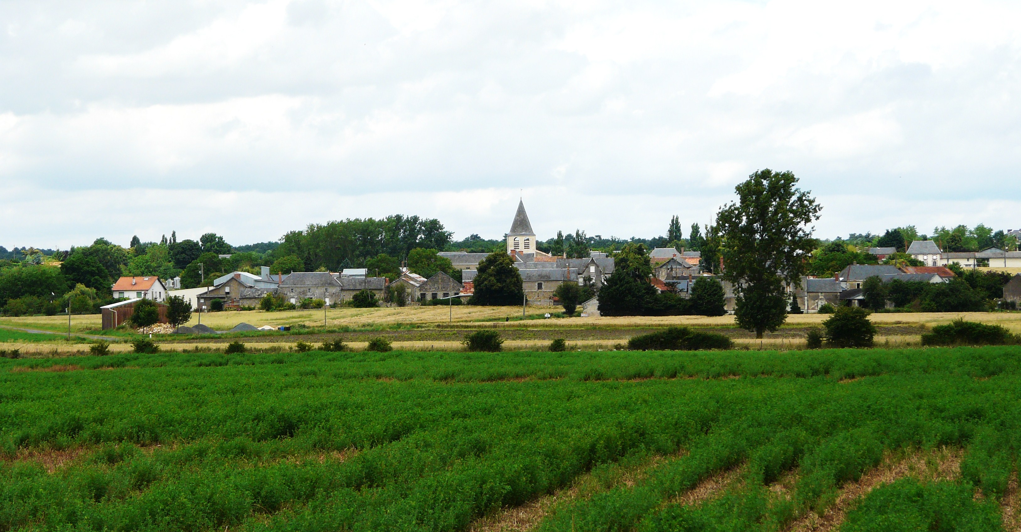 Vue générale de Taizé